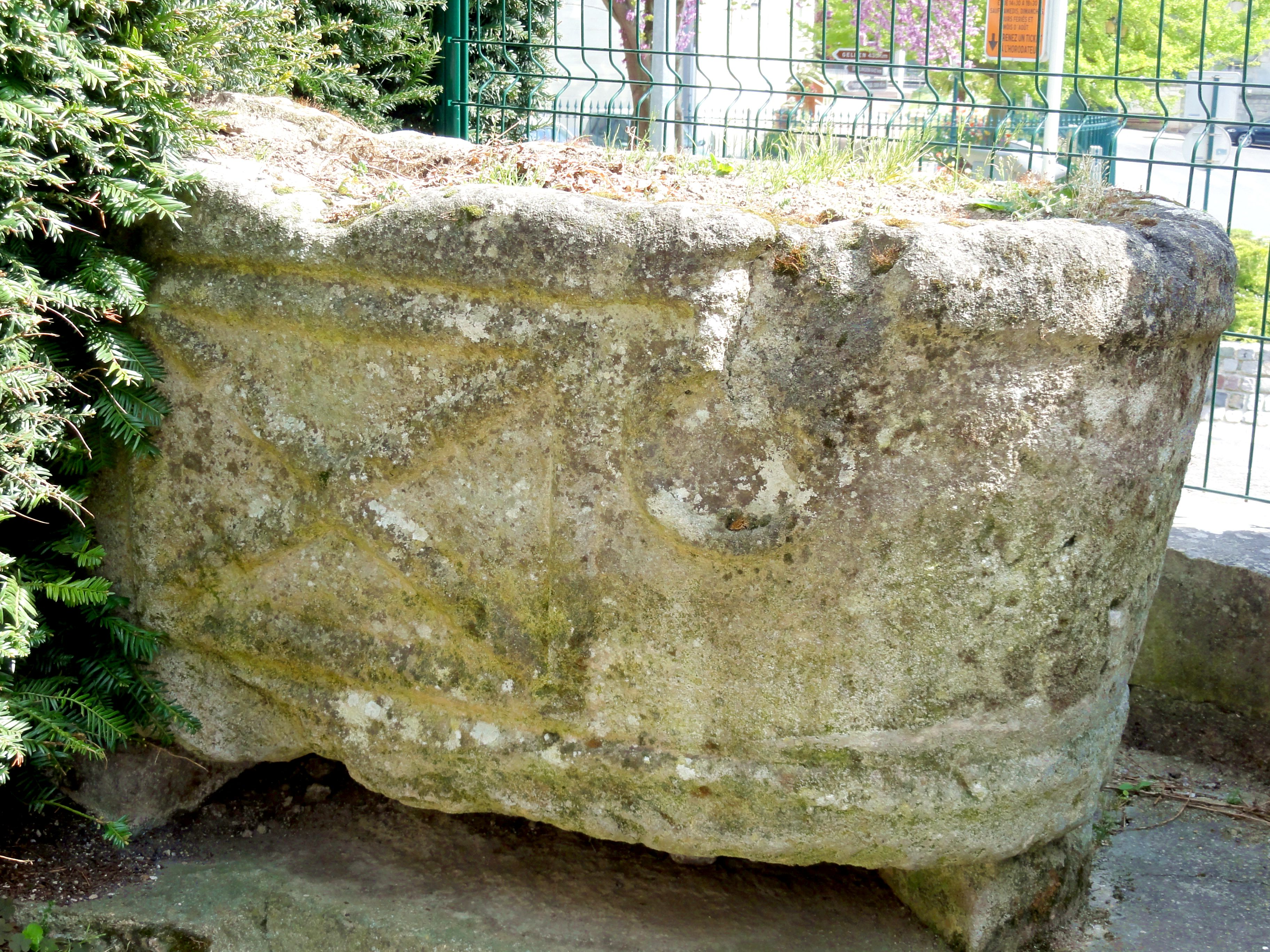 Fonts baptismaux de Boissy-l'Aillerie, IVe ou Ve s.